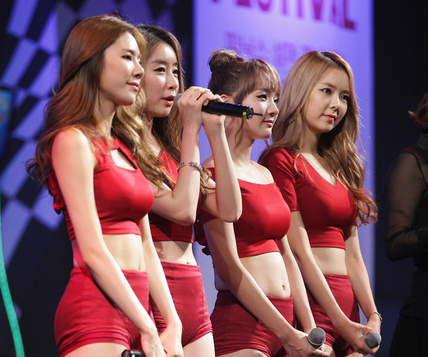 스텔라(Stellar) 2015 피닉스 섬머 페스티벌 일산 킨텍스